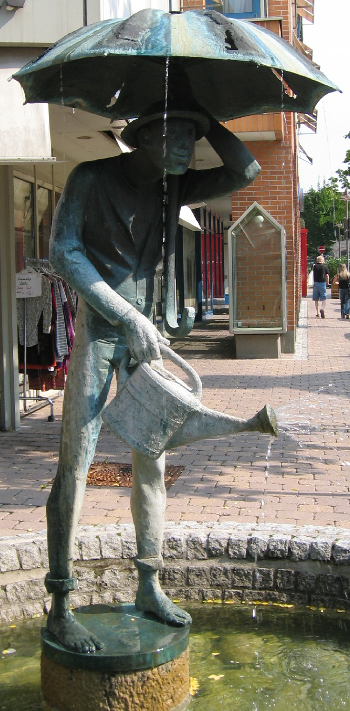 Hamballebrunnen mit Figur von Hermann Koziol in Öhringen